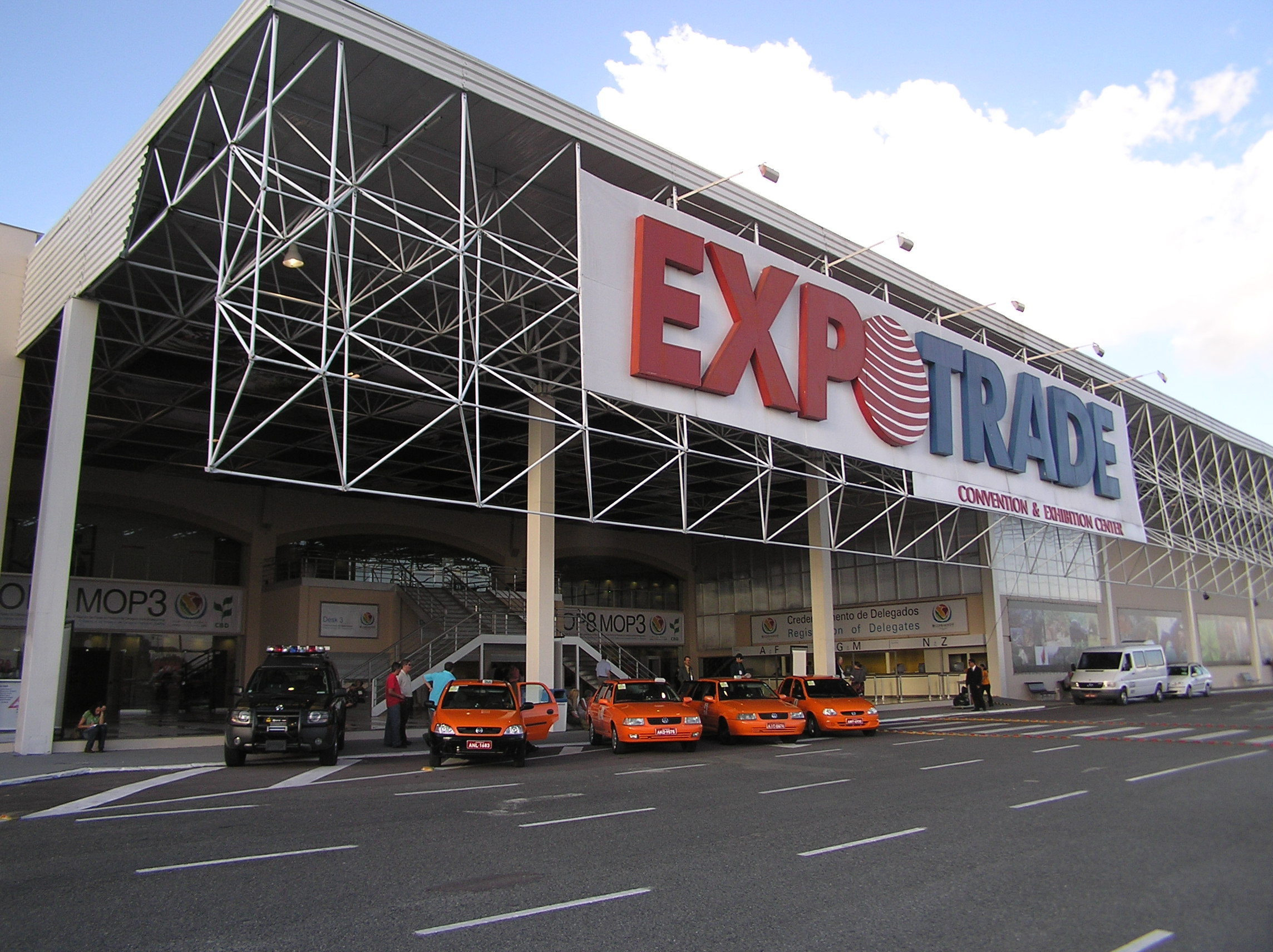 COP8MOP3: Expo Trade